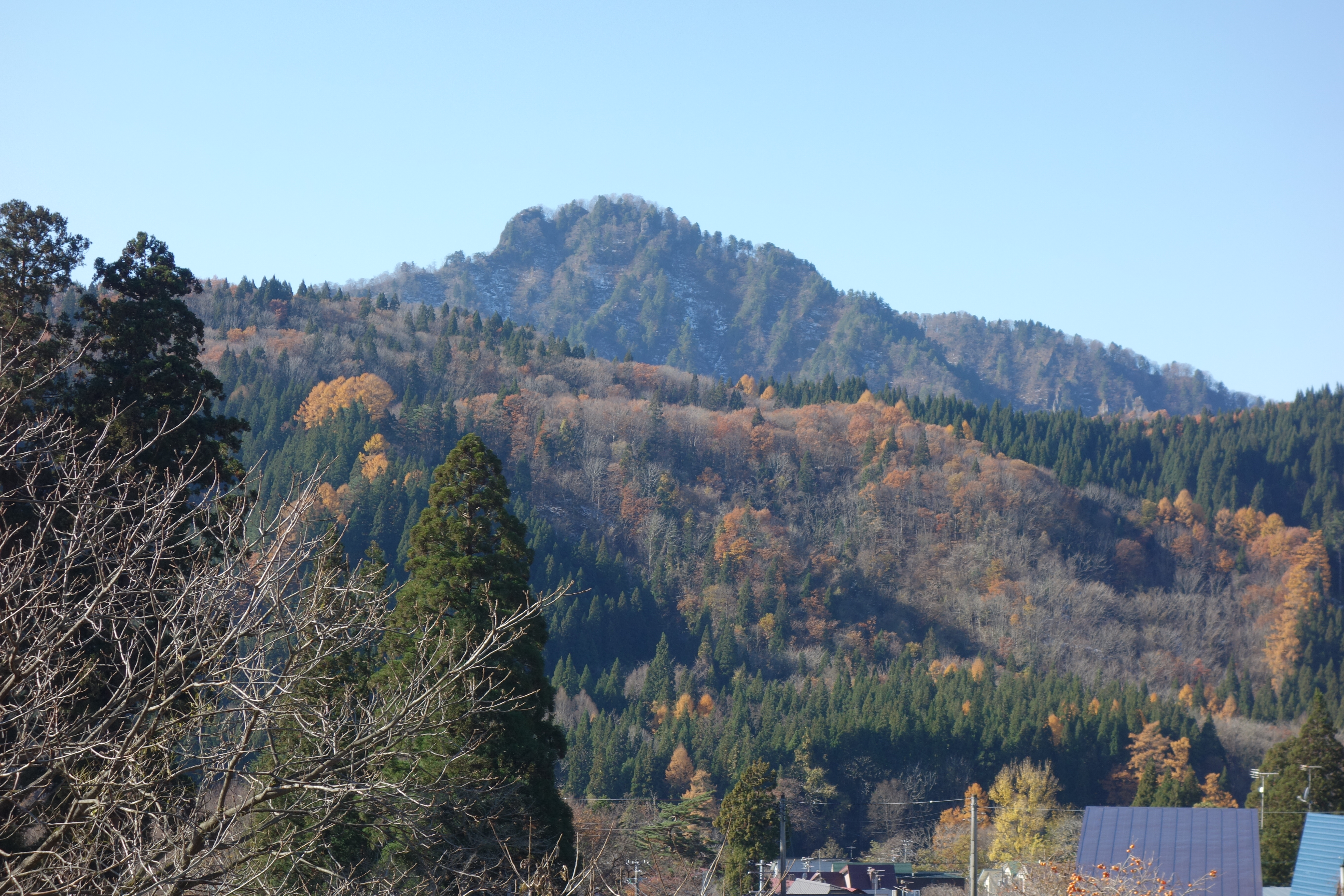 北秋田市と上小阿仁村の境にある姫ヶ岳 阿仁町国道105号より撮影